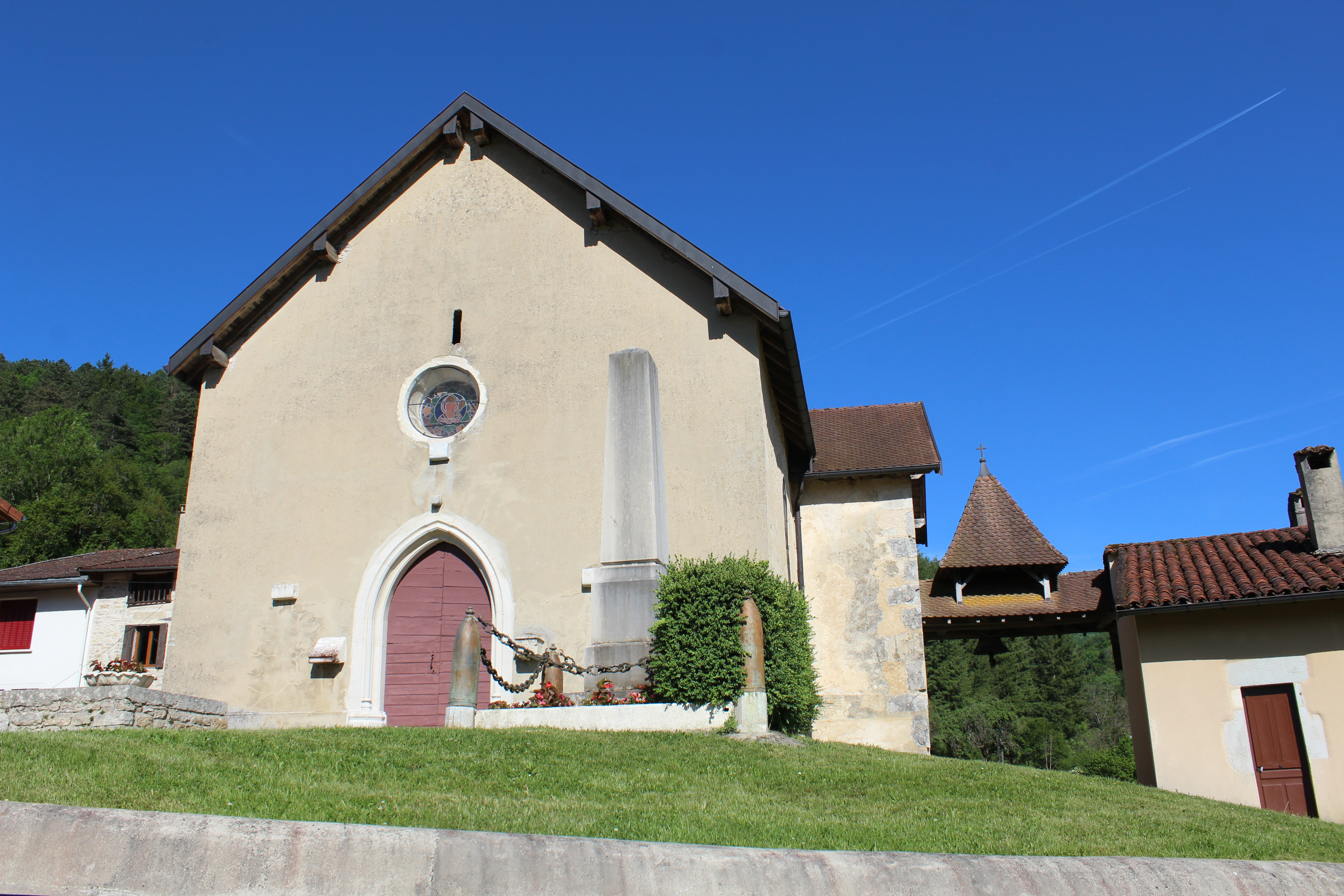 Église Saint-Germain de Germagnat.